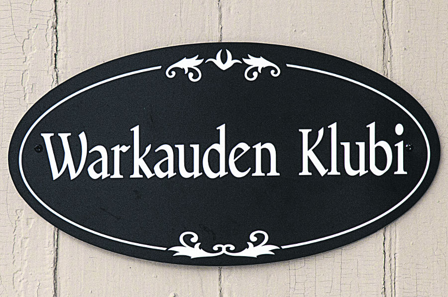 Warkauden Klubi.